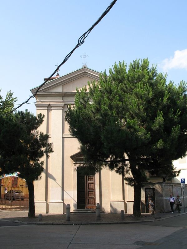 Chiesa San Giacomo Saronno